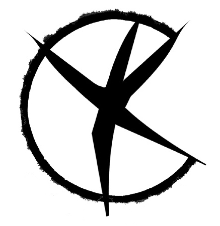 연세극예술연구회